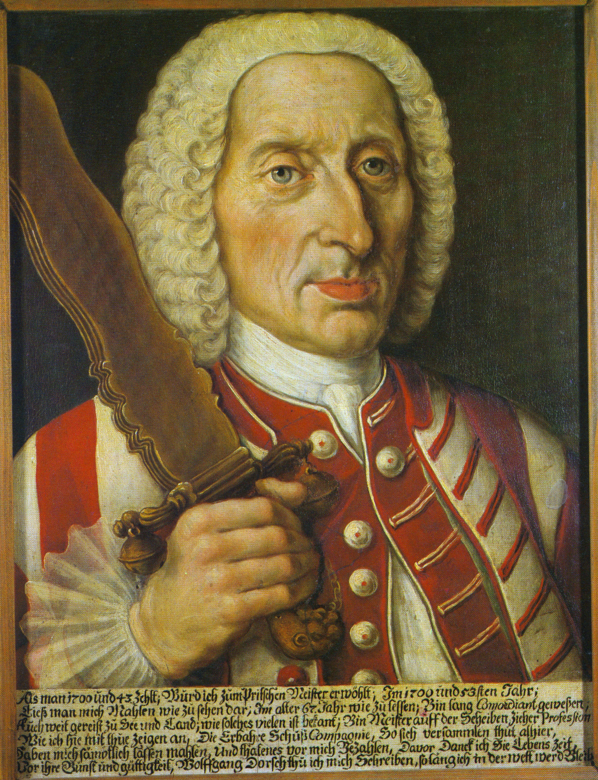 Porträt des Pritschenmeisters Wolf Dorsch der Schießgesellschaft St. Johannis zu Nürnberg, Öl auf Leinwand im Eigentum der Hauptschützengesellschaft Nürnberg